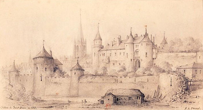 Château de Saint-Dizier en 1555 : dessin imaginaire de la ville au temps du siège de 1554.